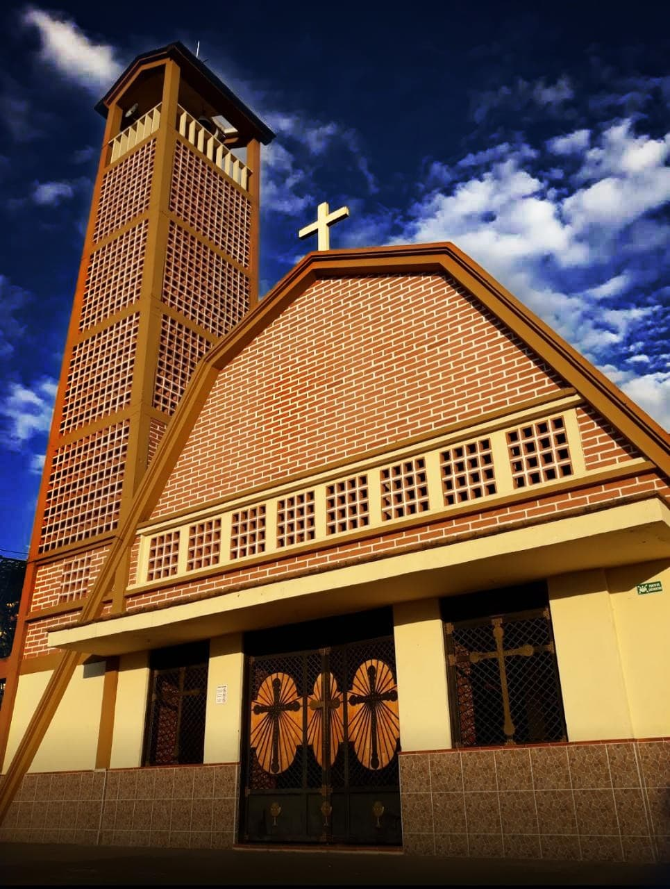 fachada Parroquia San Blas Manrique Medellin